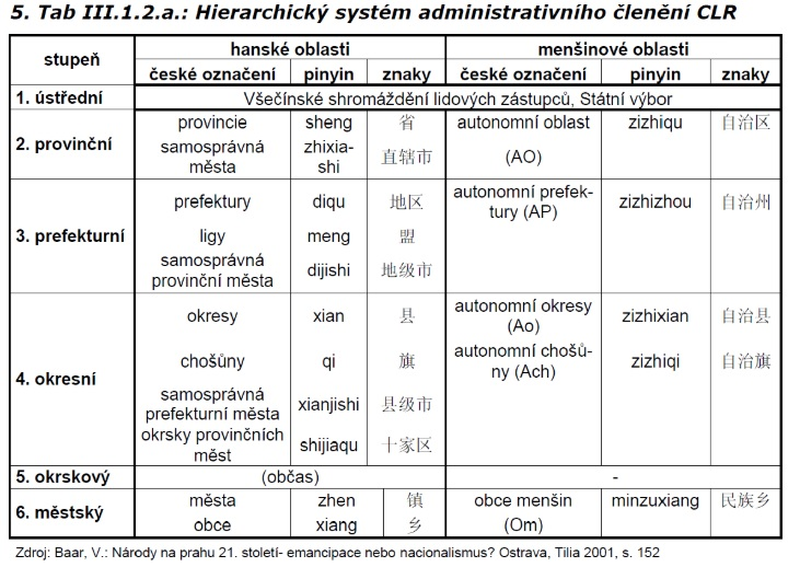 Tabulka administrativního členění v Číně - v češtině, pinyinu a čínských znacích